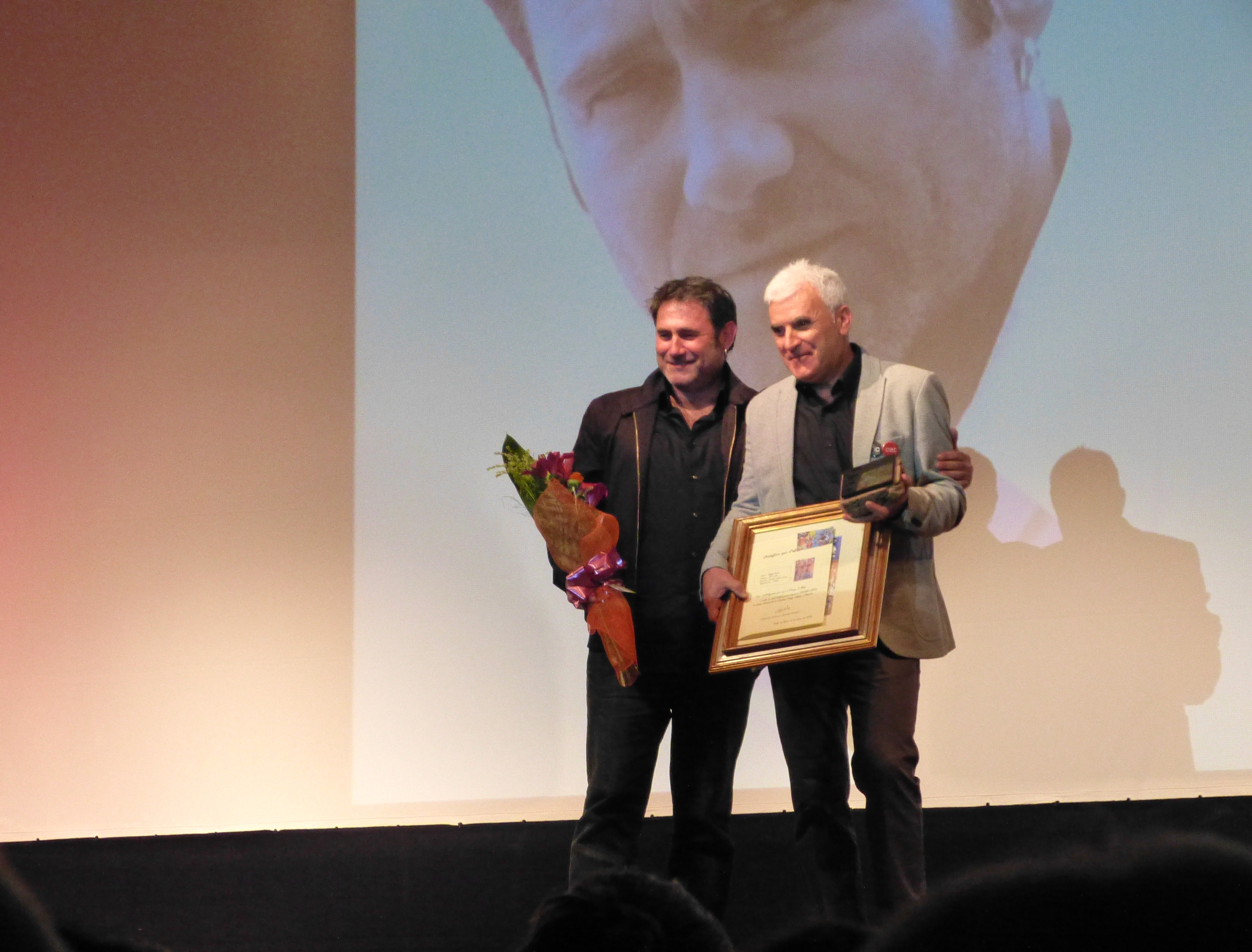 6a edició del fic-cat (Festival Internacional del Cinema en Català), celebrat a Roda de Barà, on Sergi López fou guardonat.